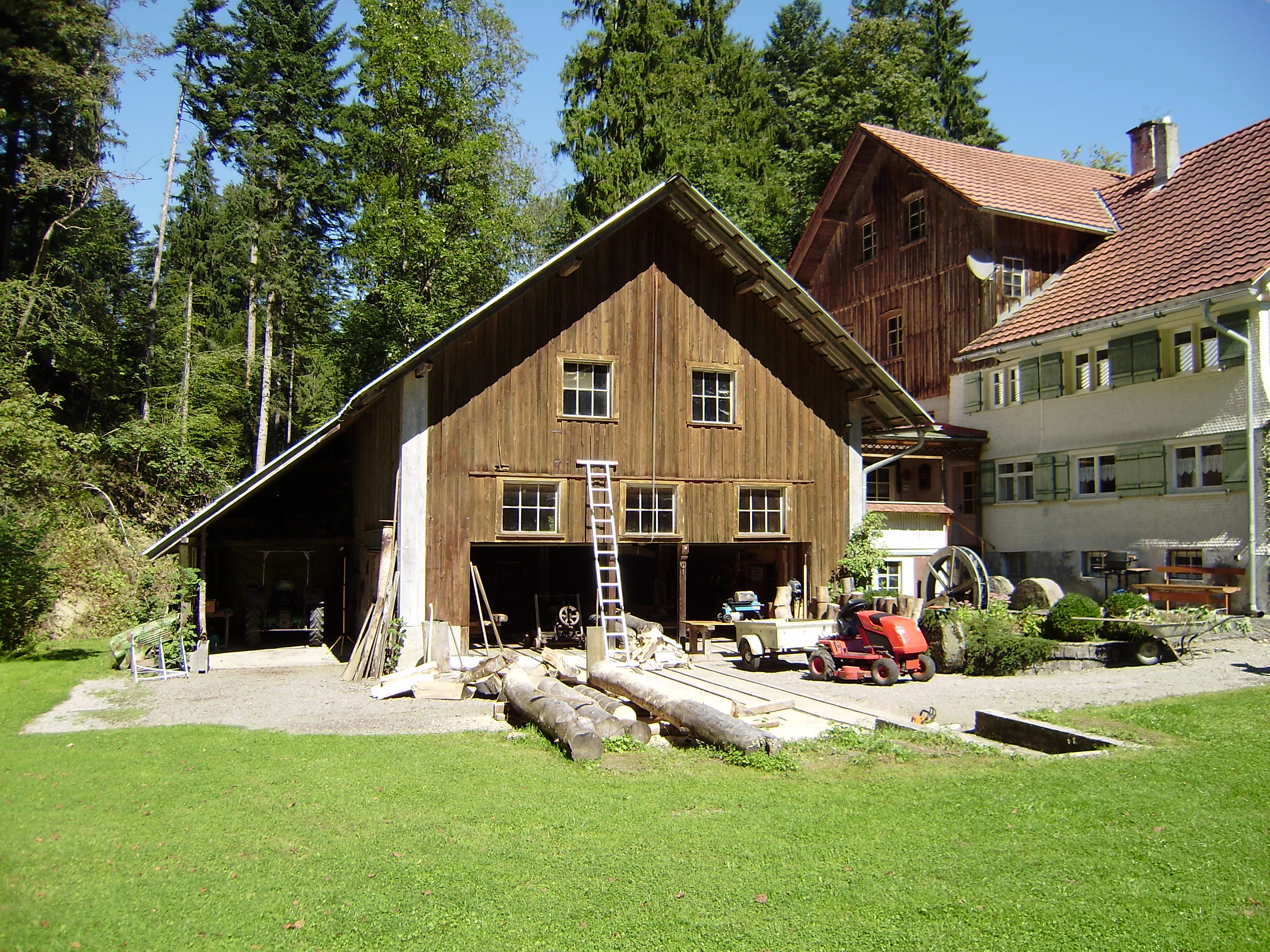 Bruggmühle bei Opfenbach-Ruhlands, SägemühleThis is a photograph of an architectural monument.